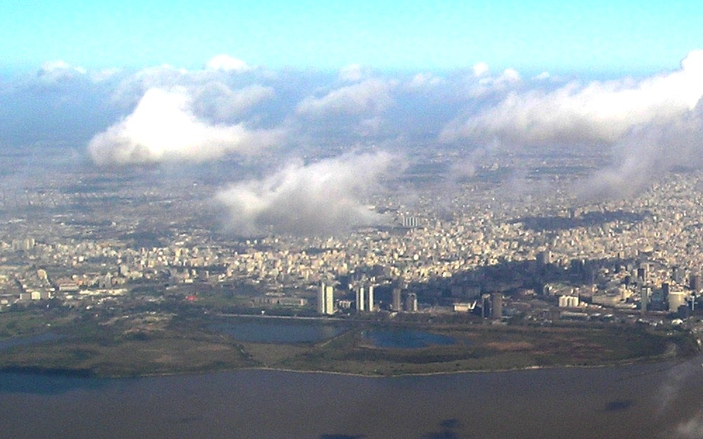 Rerva ecológica de Buenos Aires (vista aérea). Argentina.